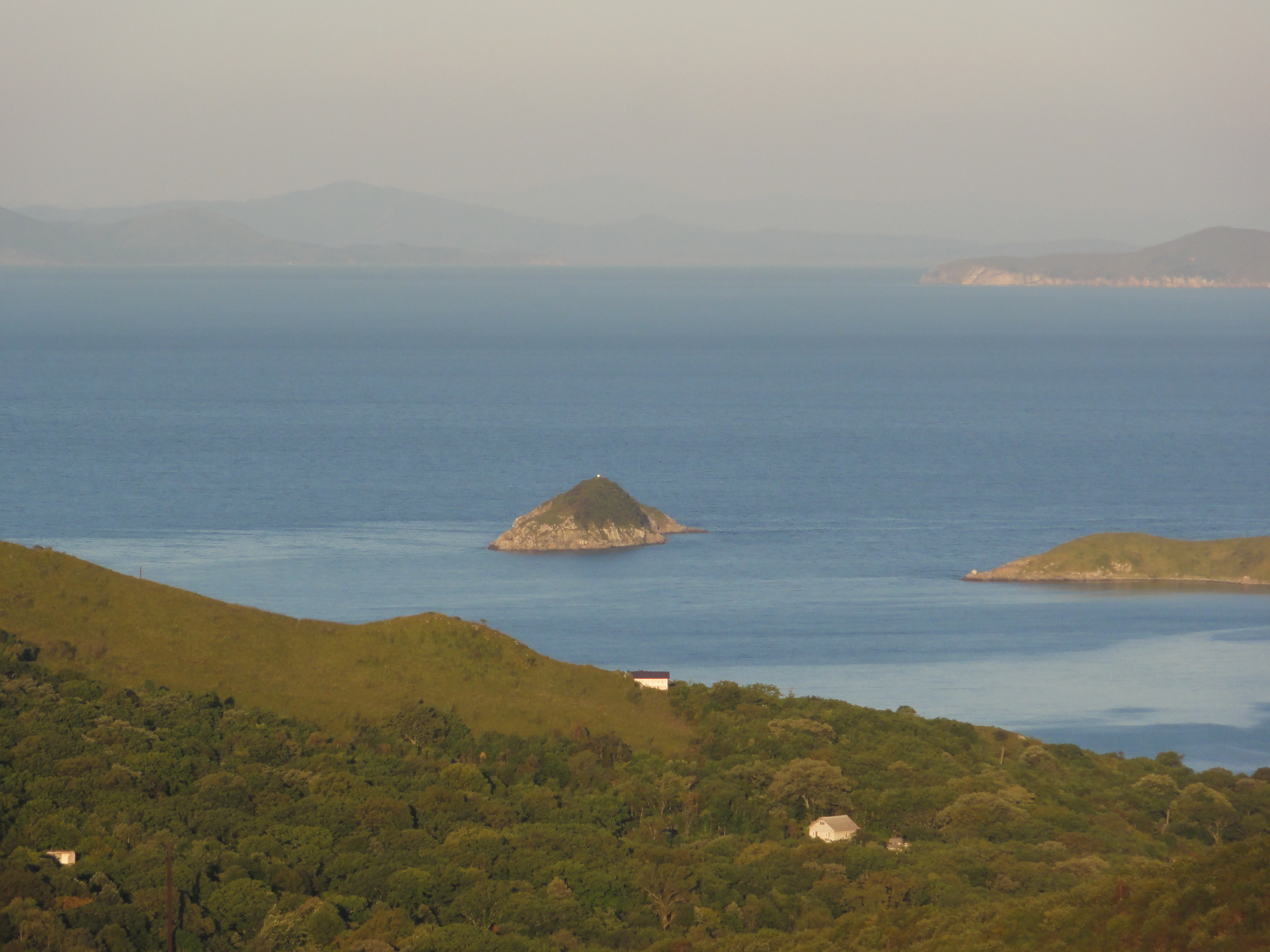 Залив Посьет, вид с п-ова Гамова. На переднем плане п. Витязь, бух. Витязь и о-ва Таранцева. На заднем плане вход в зал. Рейд Паллады.